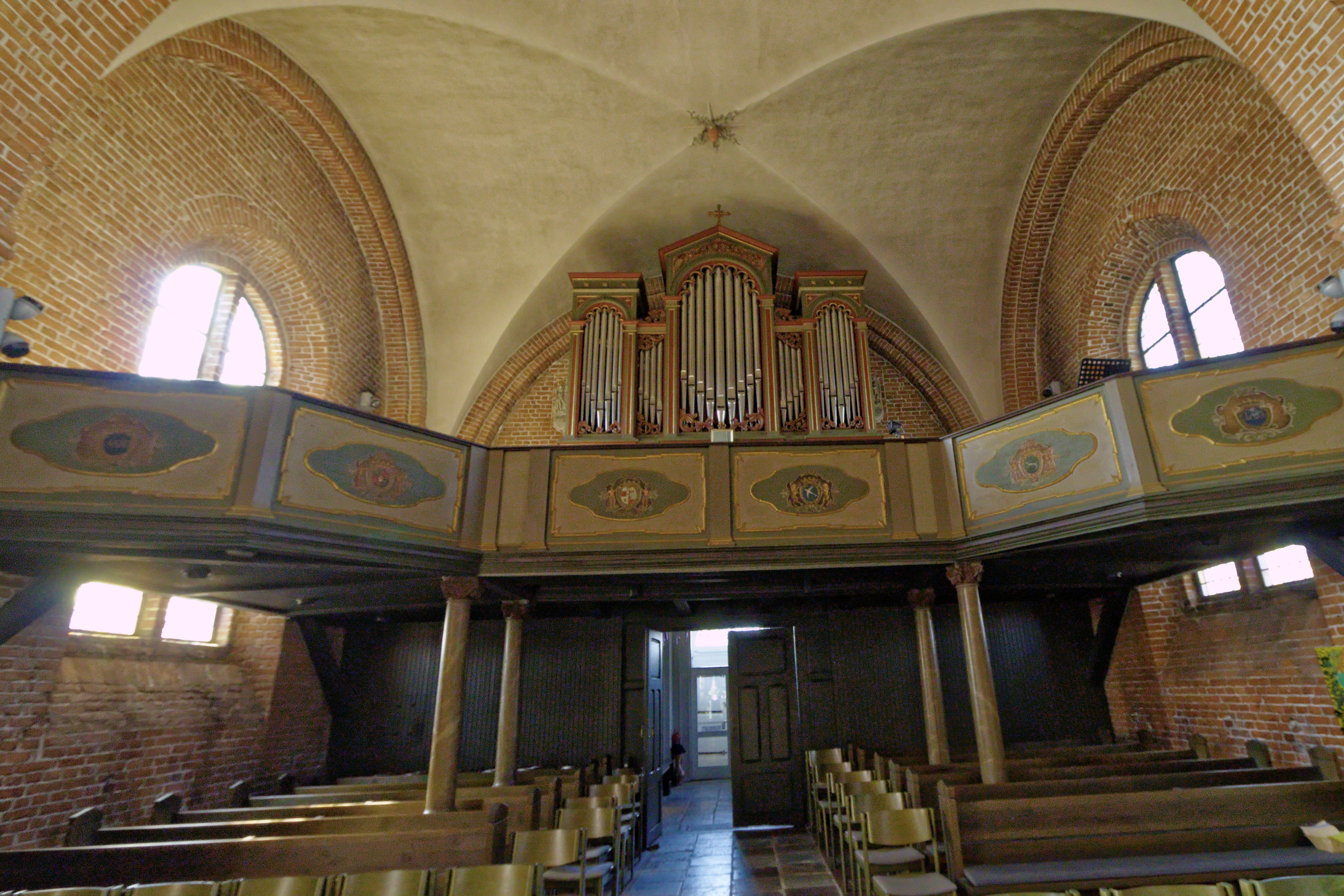 Krusendorf, Kirche St.Trinitatis; Innenausstattung